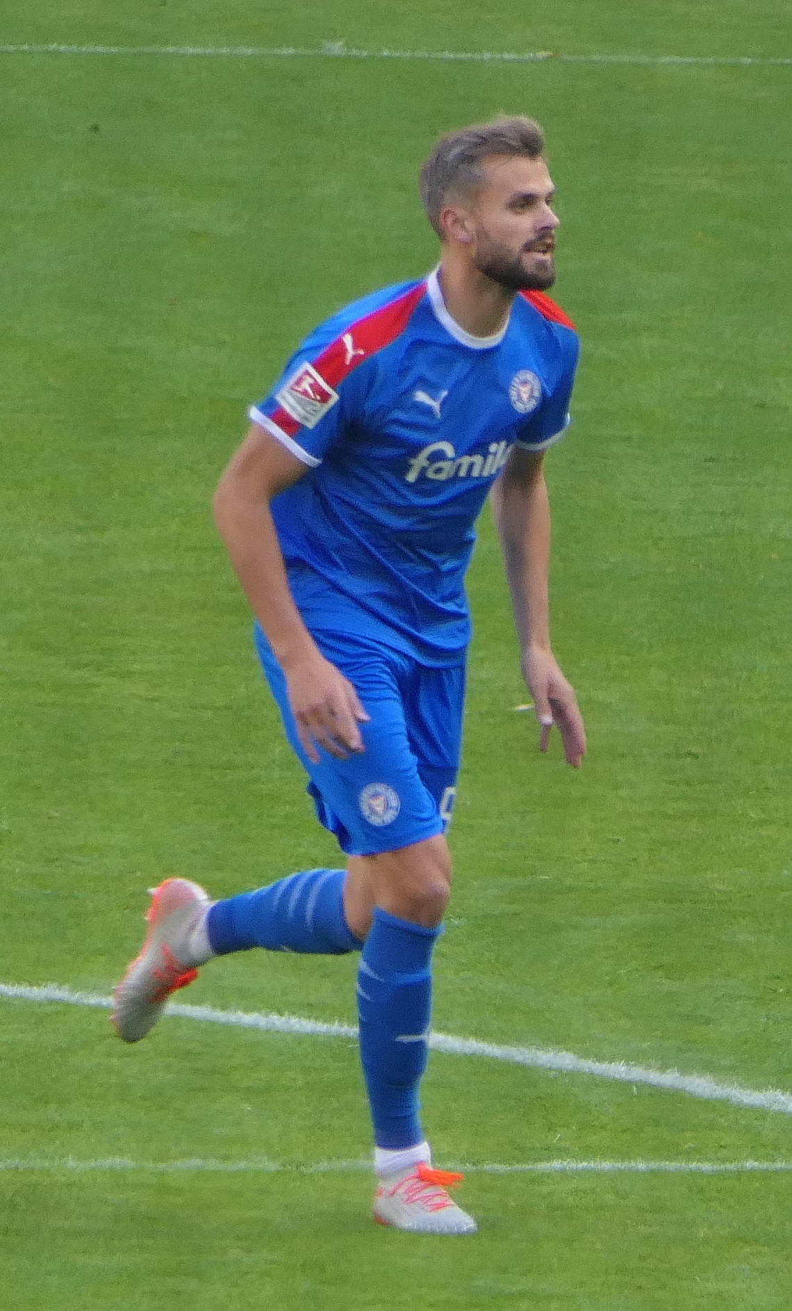 Der Fussballprofi Stefan Thesker im Trikot von Holstein Kiel beim Auswärtsspiel gegen den VfB Stuttgart am 20.10.2019.